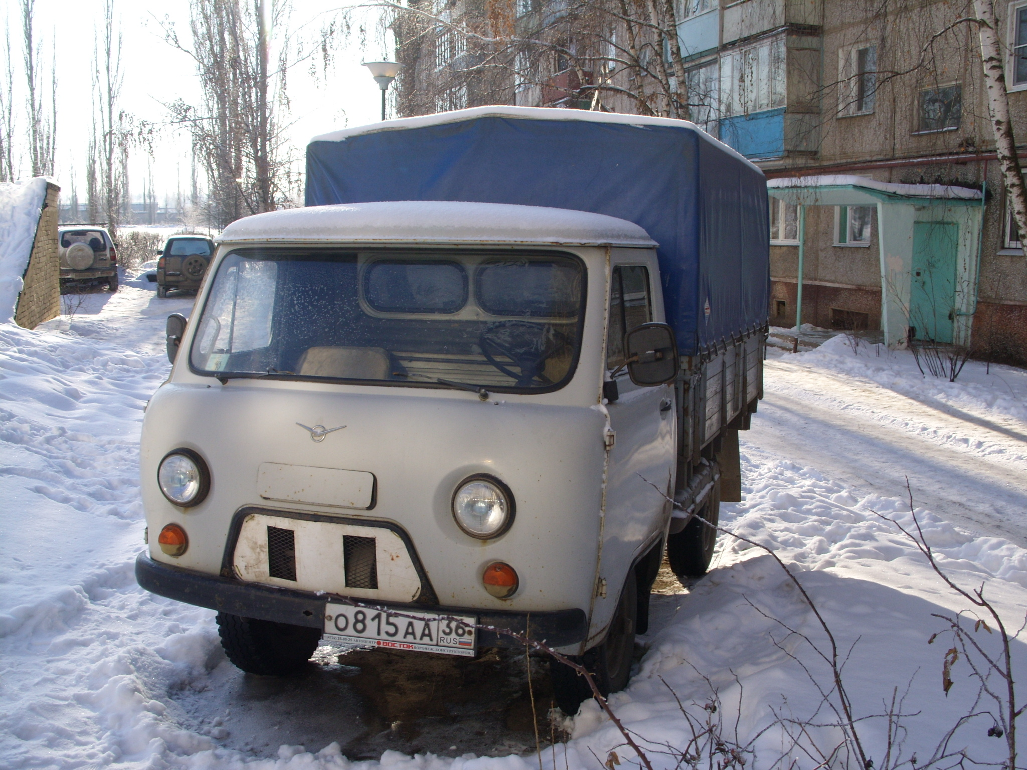 Мой УАЗ 3303